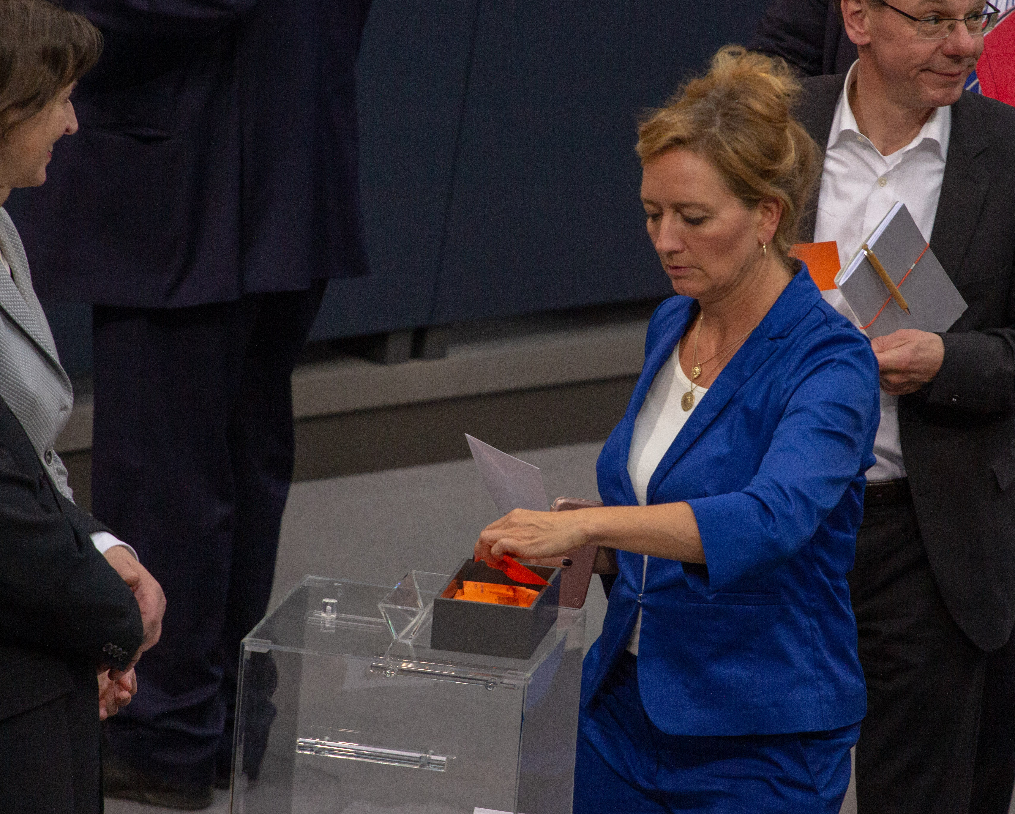 Caren Lay, Mitglied des Deutschen Bundestages, während einer Plenarsitzung am 11. April 2019 in Berlin.